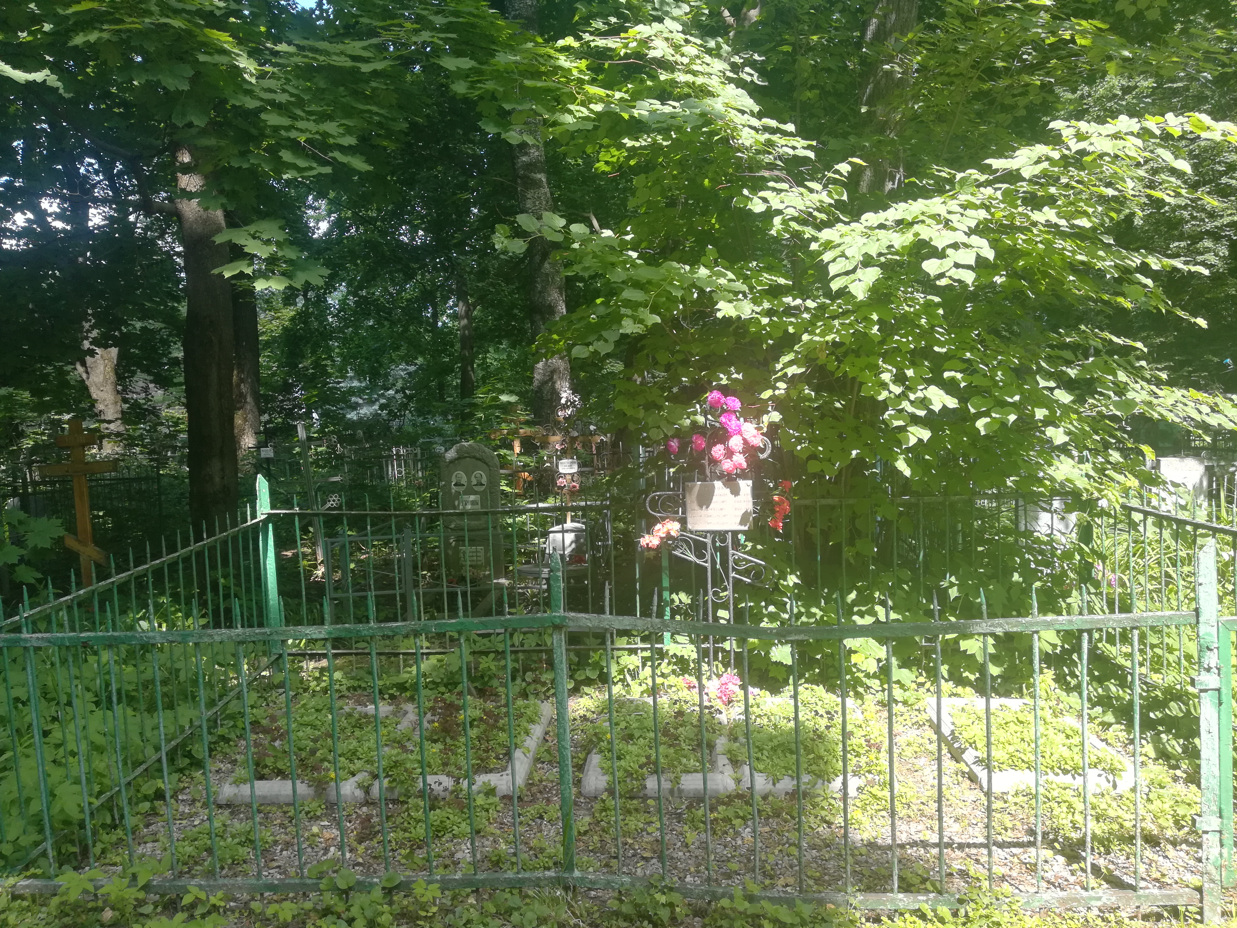 Владимир